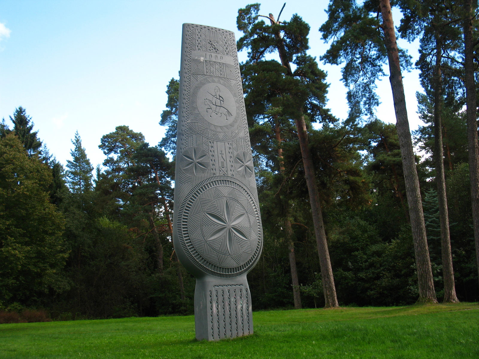 Скульптура «Дрэва адзінства» ў Закрэце. Sculpture Vienybės medis (”The Tree of Unity”) by Tadas Gutauskas in Vingio Park